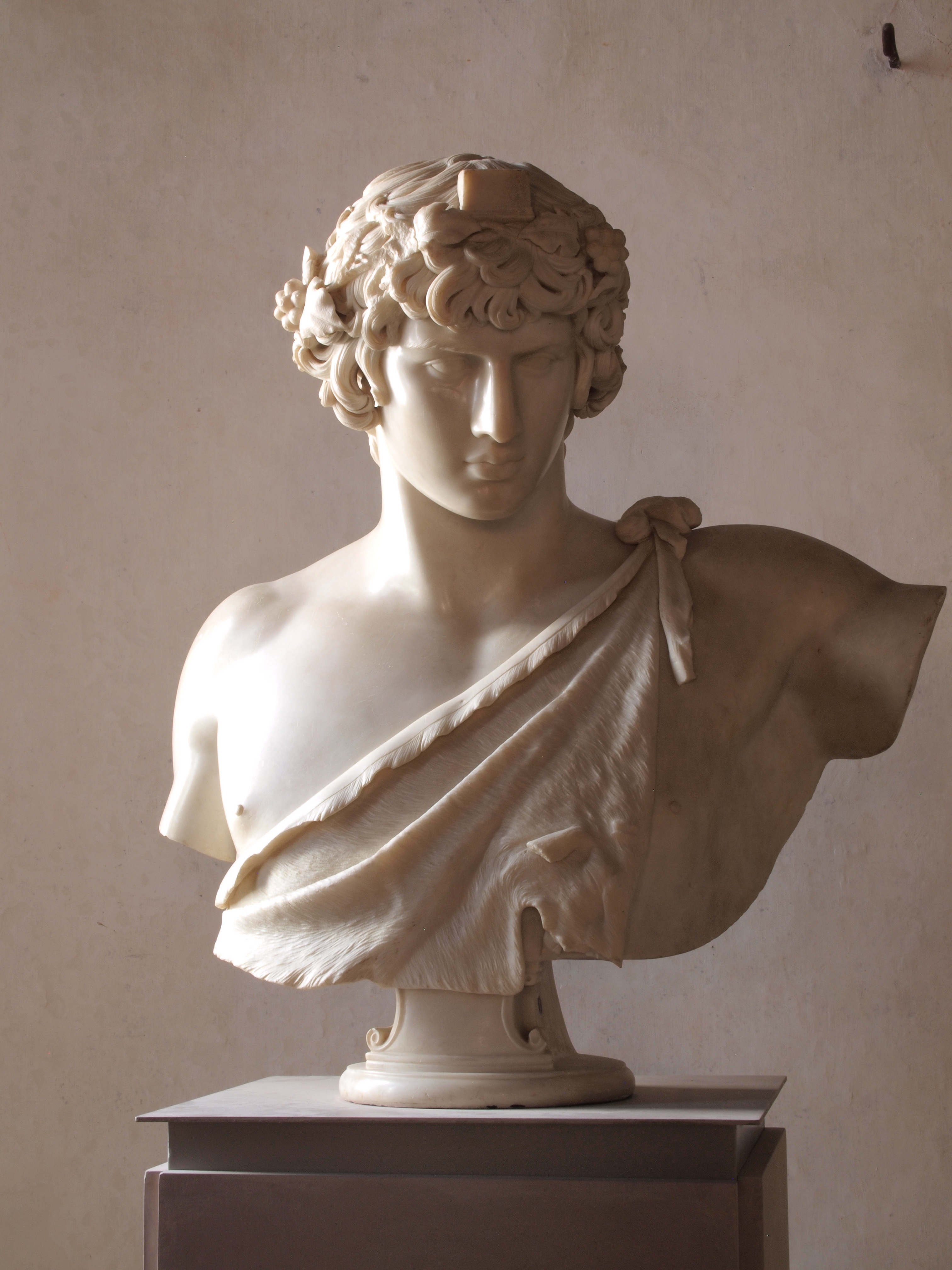 Museo di Palazzo Grimani (Castello) - MIBAC This is a photo of a monument which is part of cultural heritage of Italy.